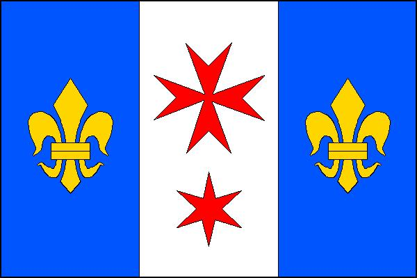 Vlajka obce Bezkov